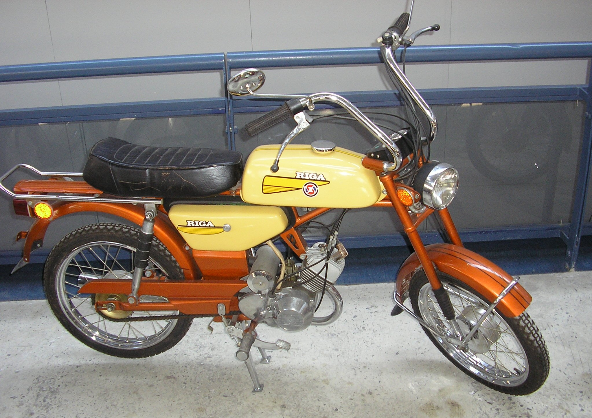 A Rīga moped